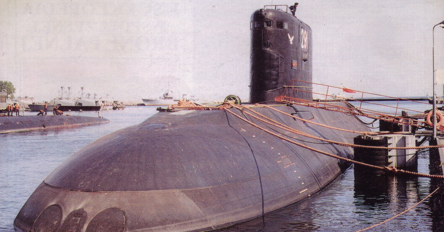 ORP Orzeł